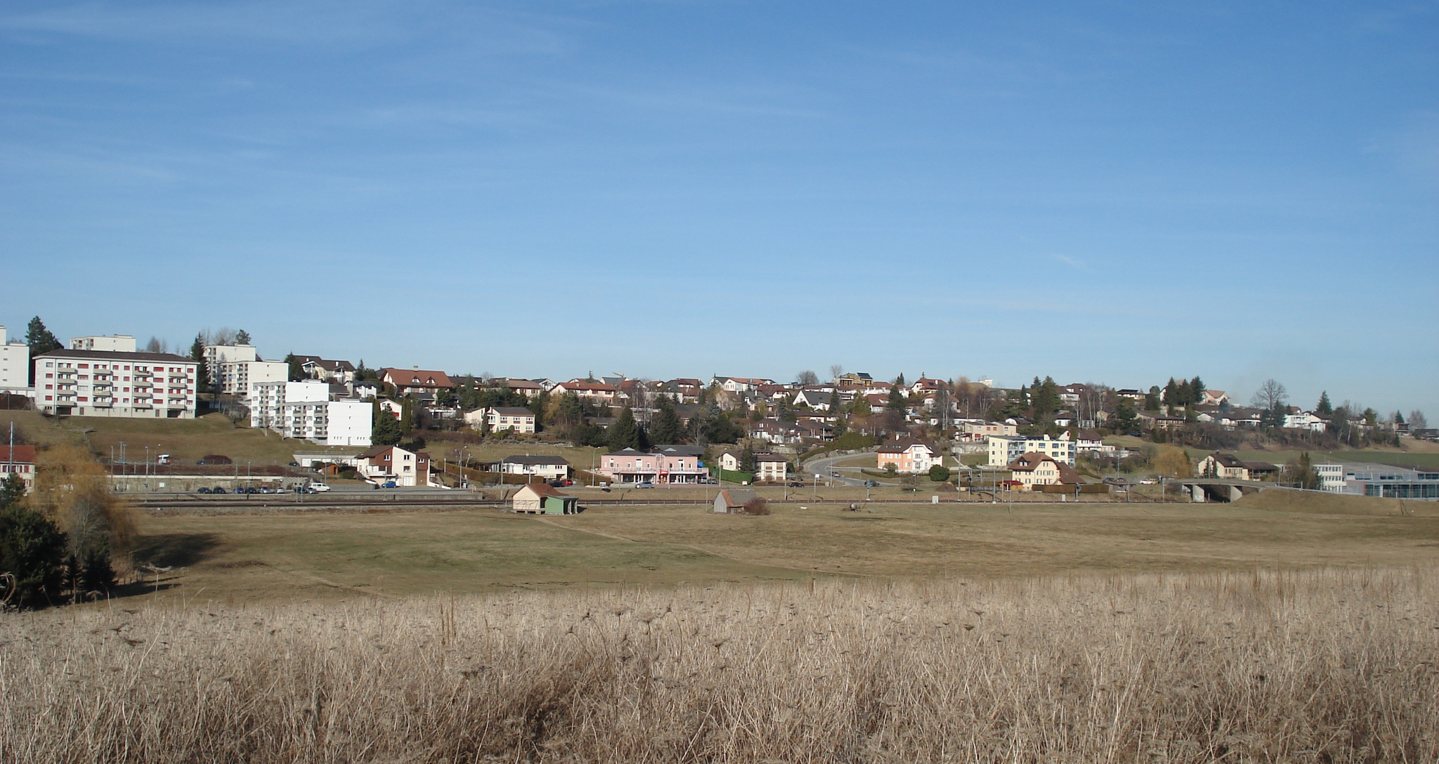 Commune d'Avry, vue du quartier de Rosé